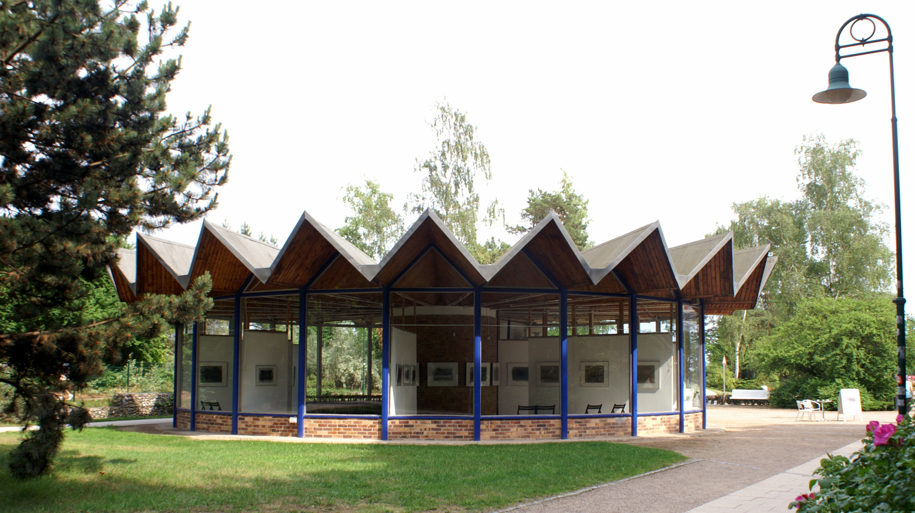 Kunstpavillon Heringsdorf, Ansicht von Nordwesten